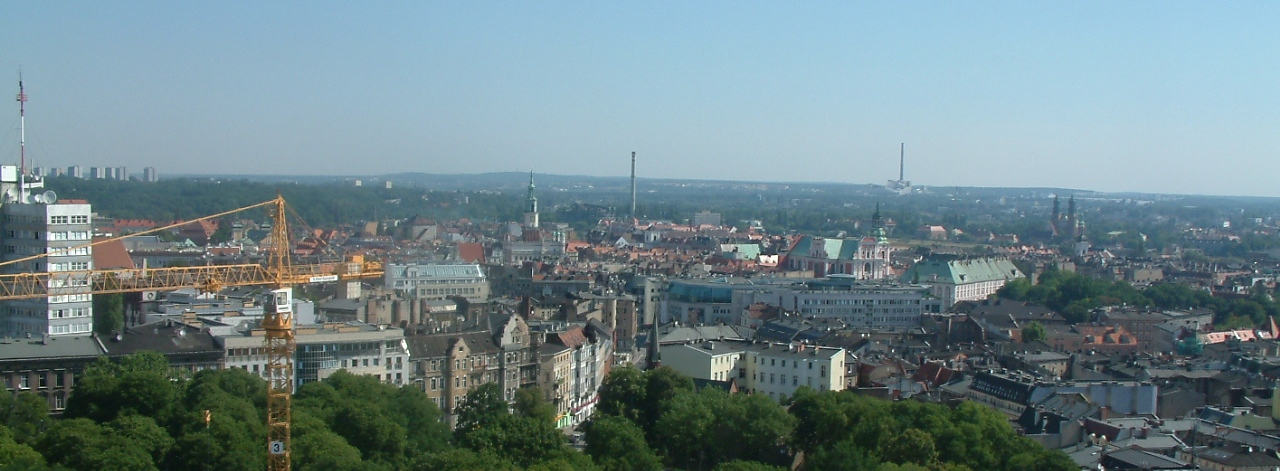 Poznań - description